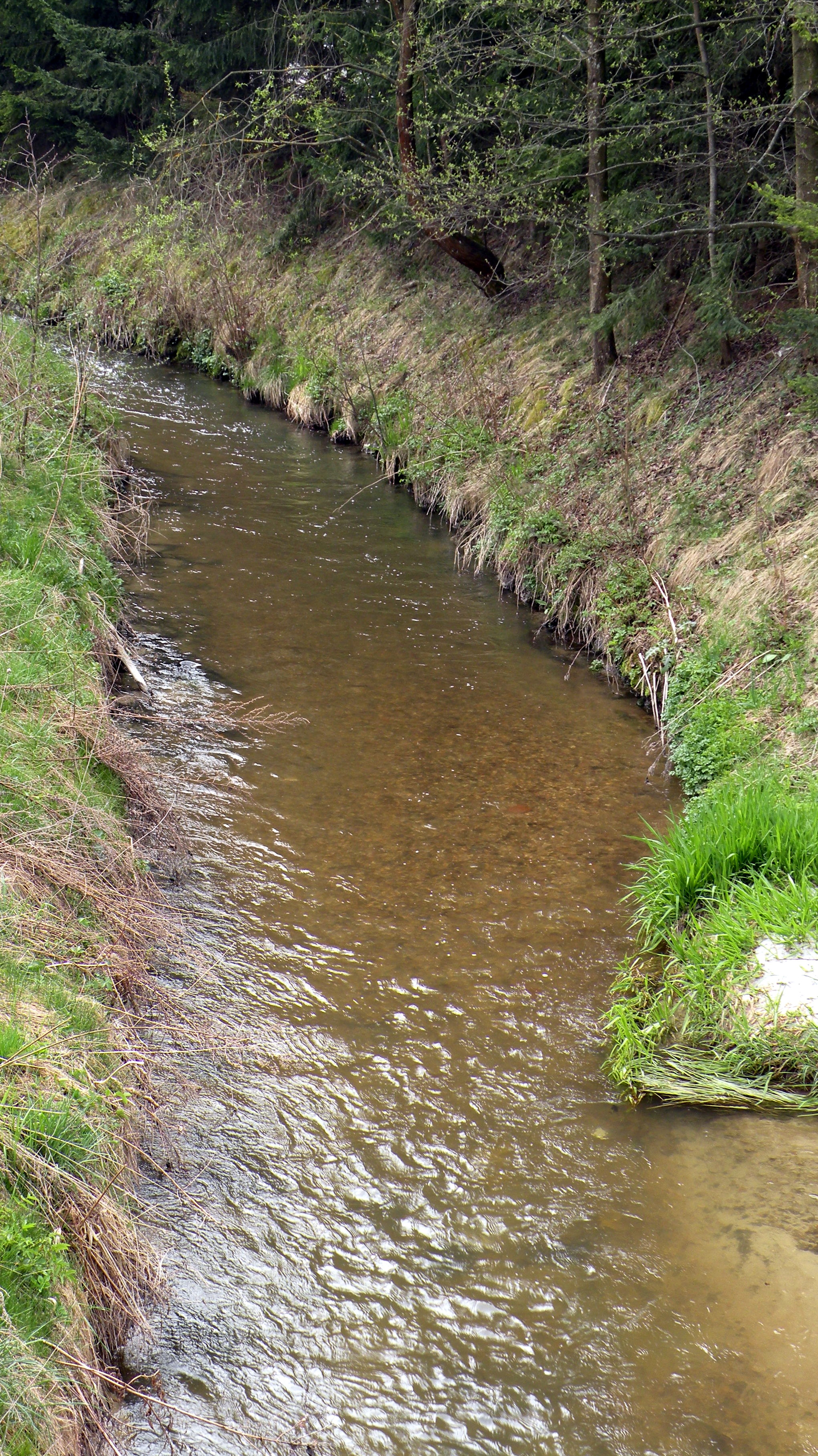 Kettenbach in der Ortschaft Kriechbaum in der Gemeinde Allerheiligen im Mühlkreis im Bezirk Perg in Oberösterreich